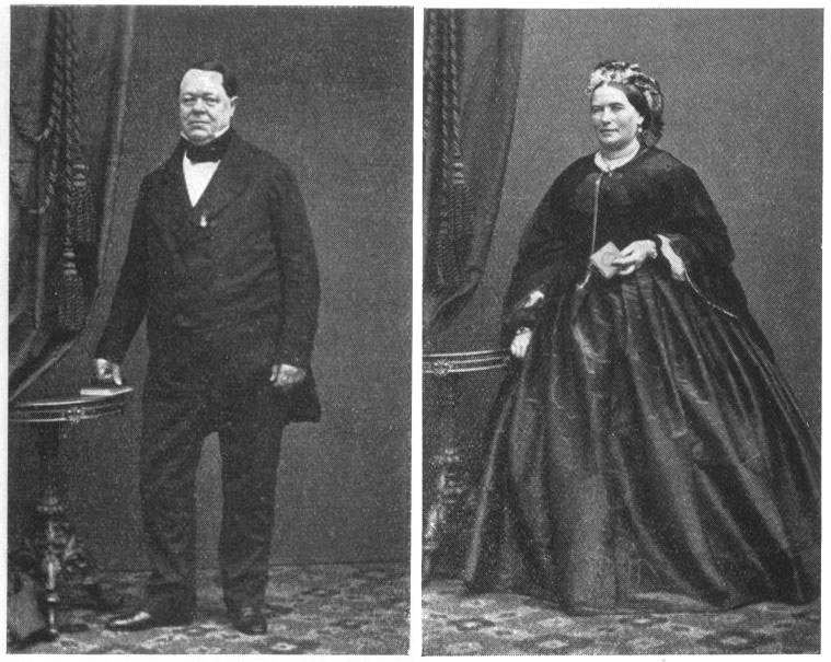 Justieborgmästare Johan Fredrik Gråå (1797-1879) och hans hustru Birgitta Kristina Gråå (1809-1890) på Västra Yttringe gård på Lidingö, fotograferade i atelje på mitten av 1800-talet.